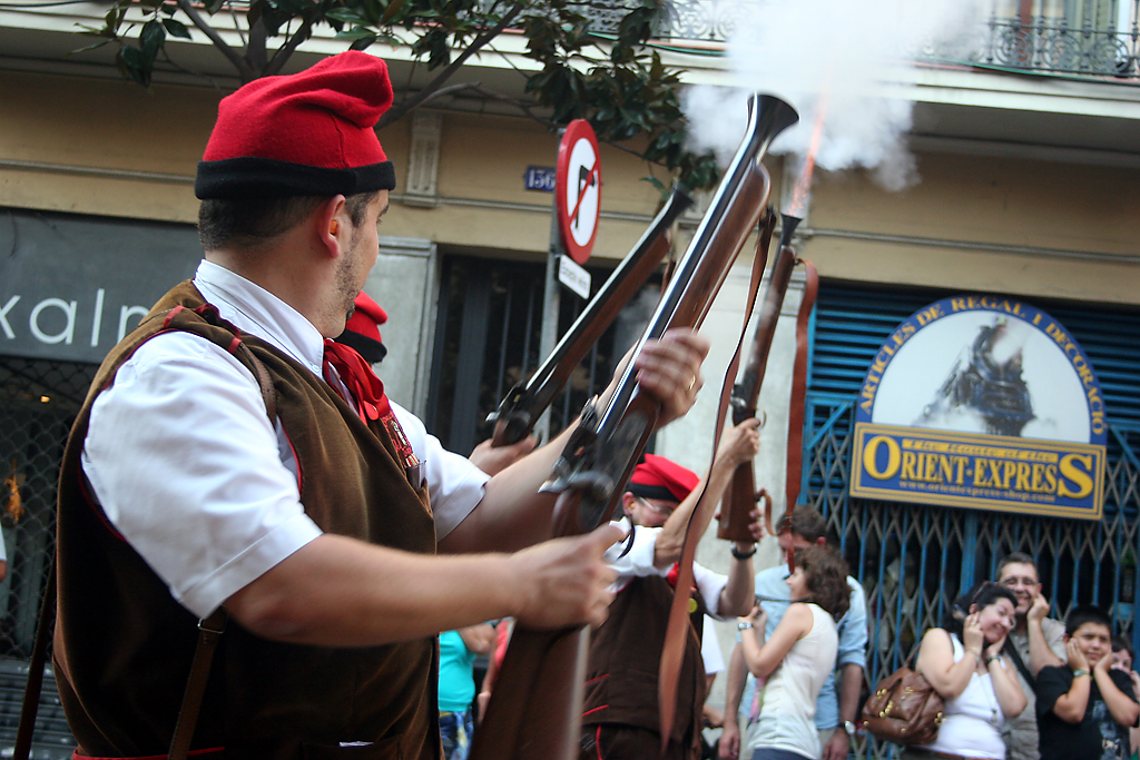 Festes de Gracia 2011